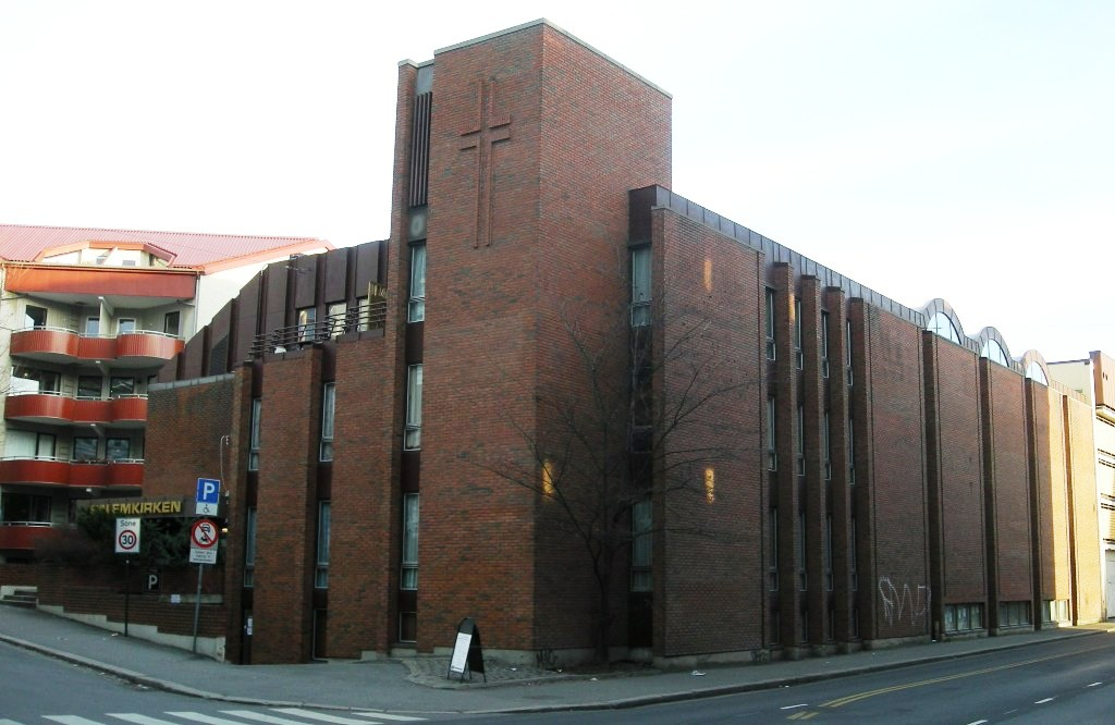 Salemkirken Oslo